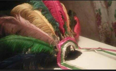 sombrero